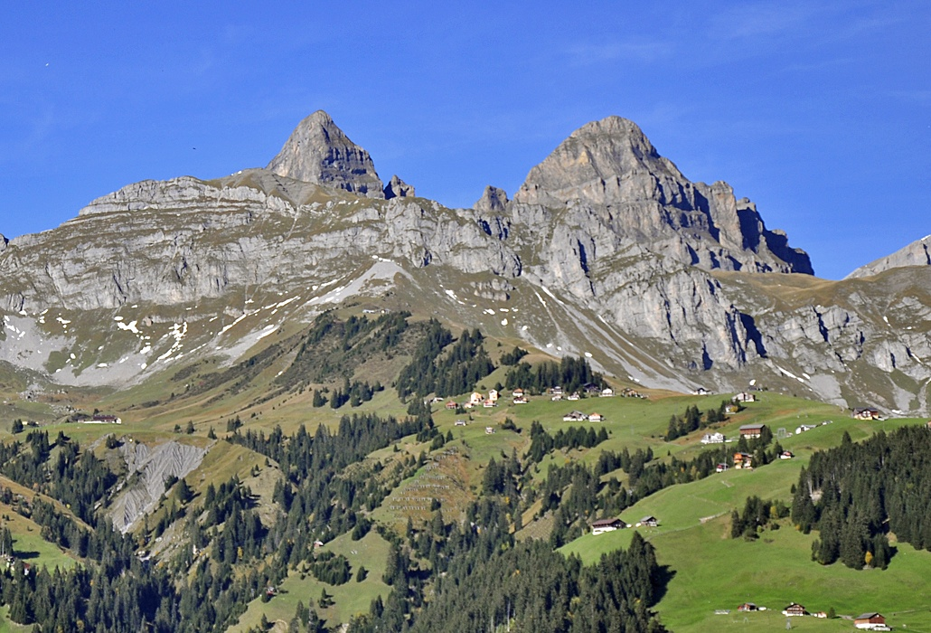 Der Rossstock (2461m)